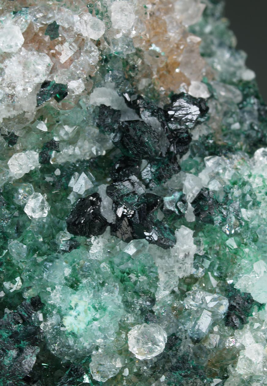 Nutrido grupo de cristales de clinoatacamita, con brillo y formas entre cúbicas y hexegonales, de intenso color verde. Se disponen sobre una matriz tapizada de brillantes cristales de cuarzo y de tonos verdes por la malaquita a la que recubren. Con yeso. Medidas: 4.4 x 4.0 x 3.5 cm. Cristal principal: 5 x 4 mm. Encontrado en 2016. Localidad: Mina Lily, Pisco Umay, Ica, Perú